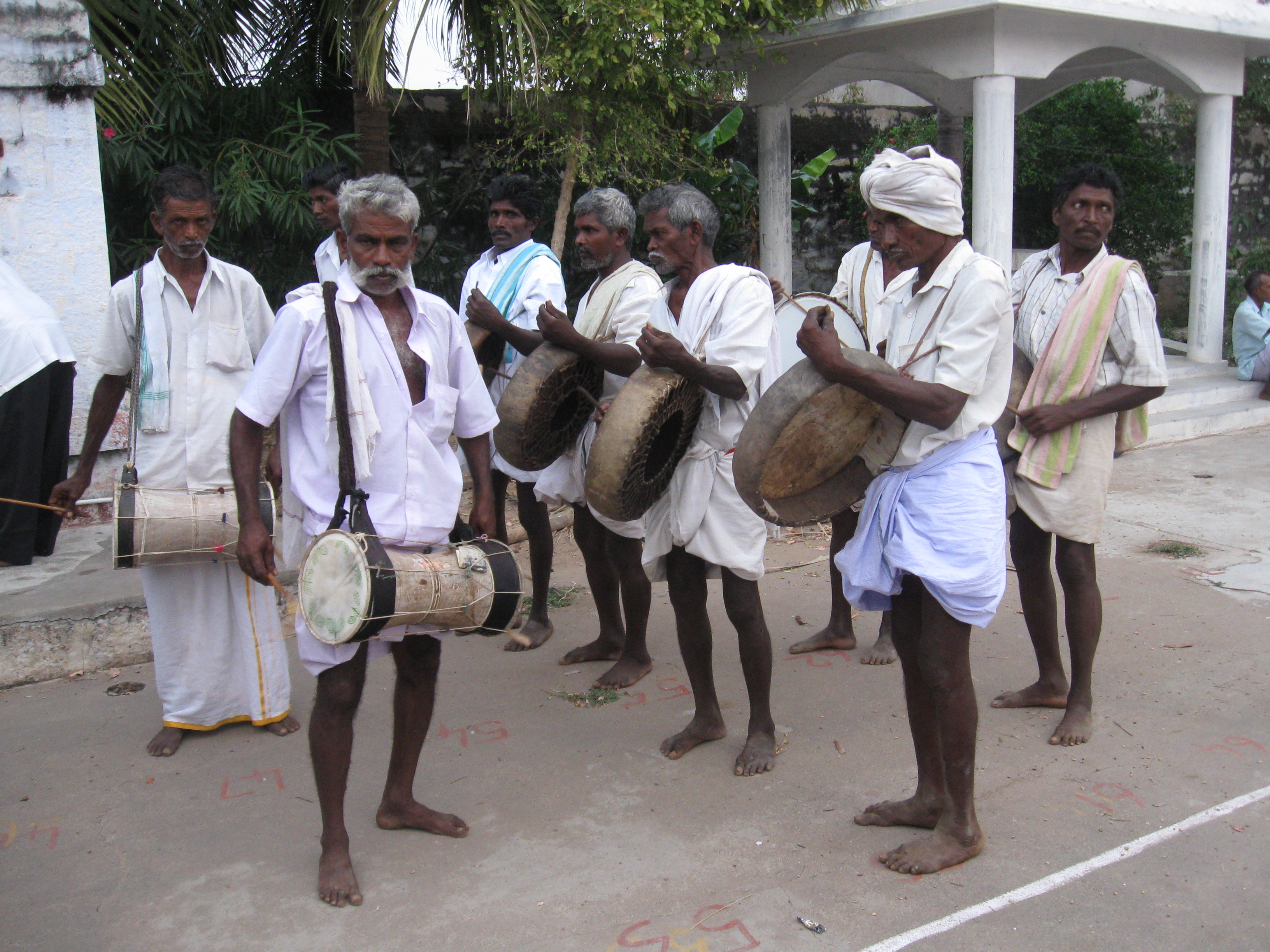 தமிழ்நாட்டின் நாயக்கர் திருமணத்தில் வாசிக்கப்படும் மோளம்